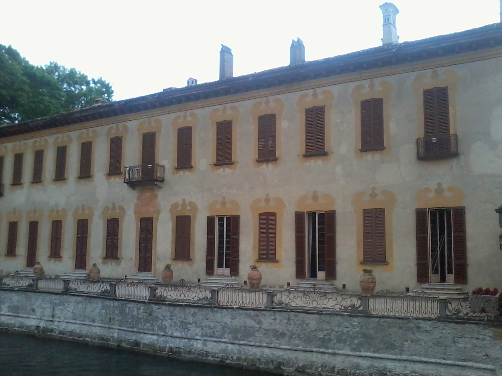 Facciata verso il Naviglio di Villa Gaia a Robecco sul Naviglio (MI) - Italia